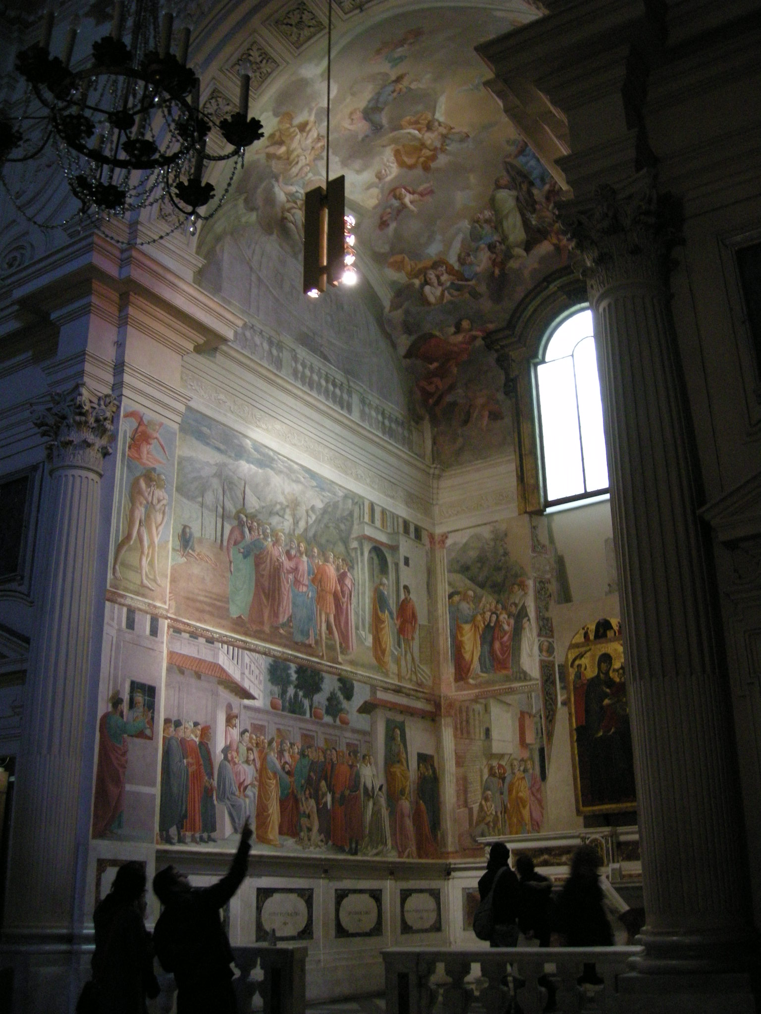 Cappella brancacci 00